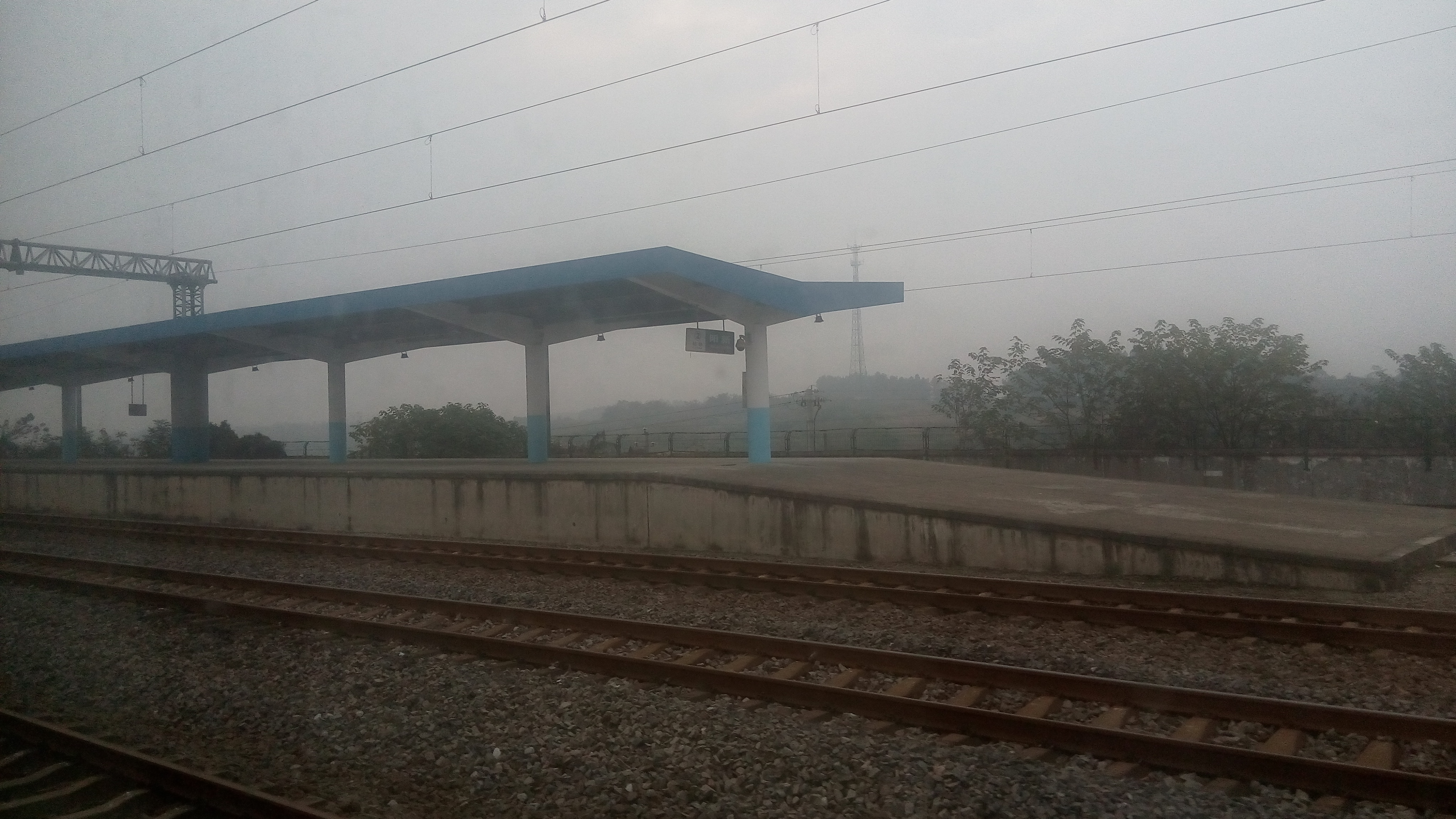 阳新站 2站台